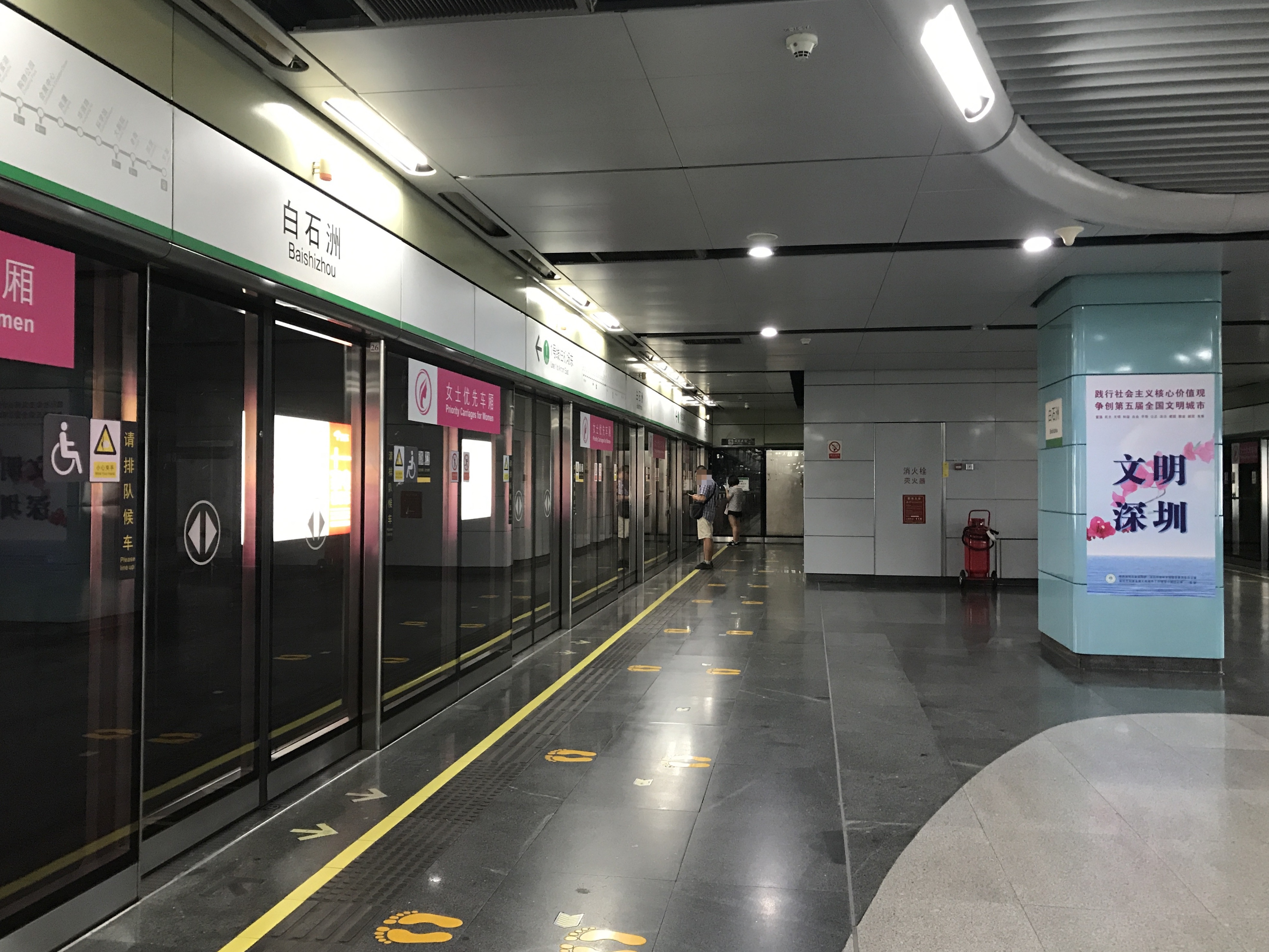 白石洲駅のホーム